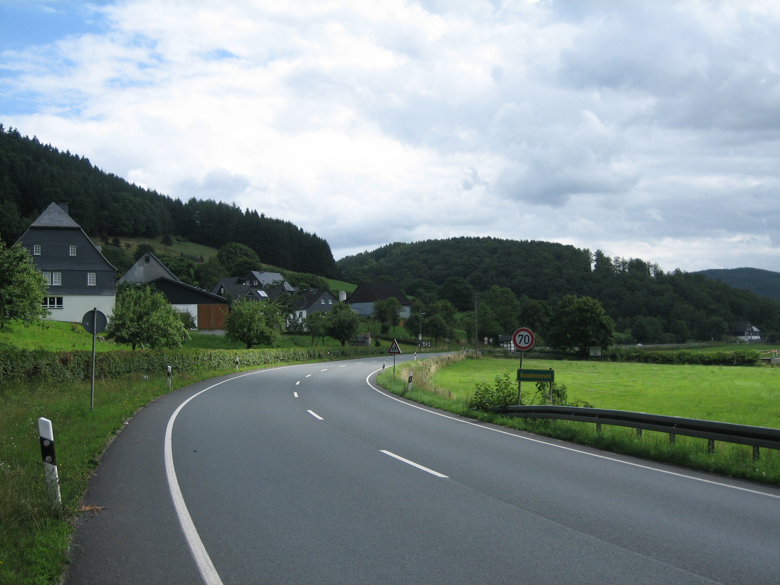 Hundesossen an der B236